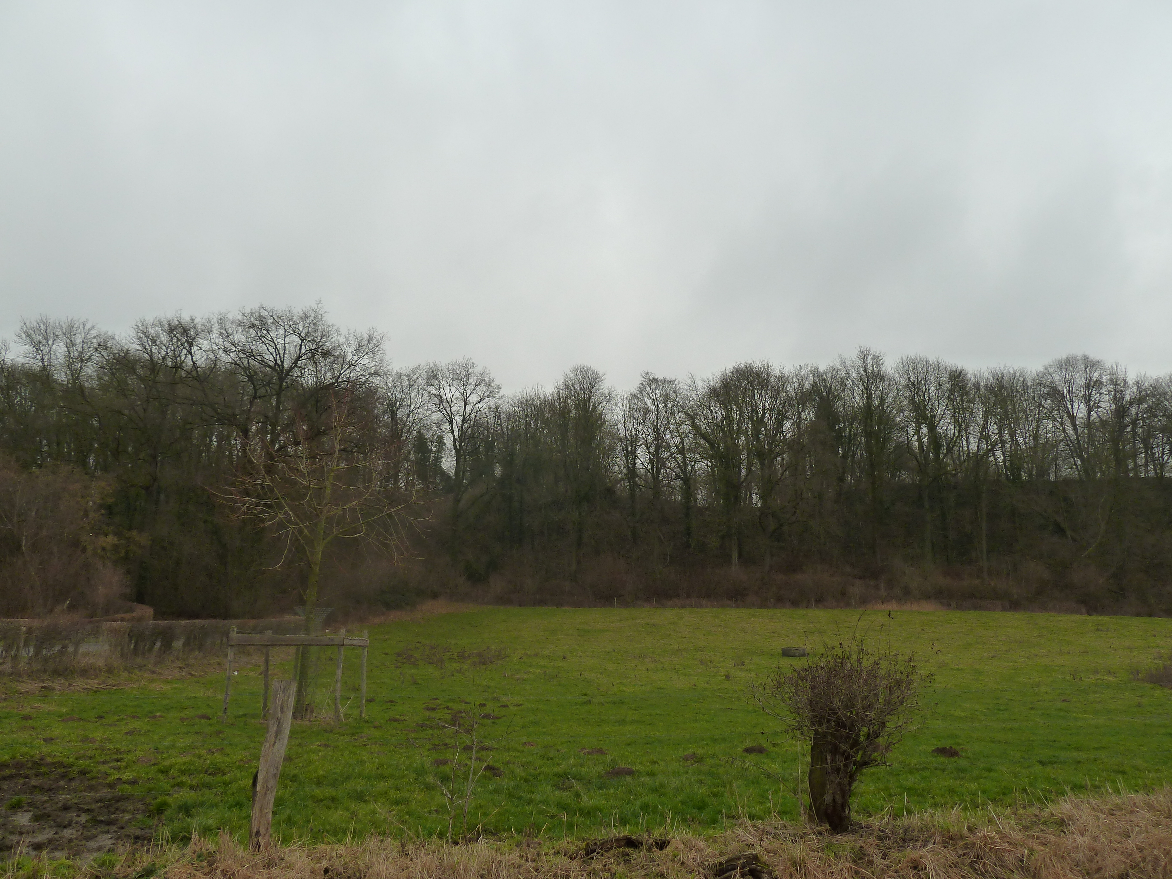 Geologisch monument Örenberg, Cadier en Keer, Nederland